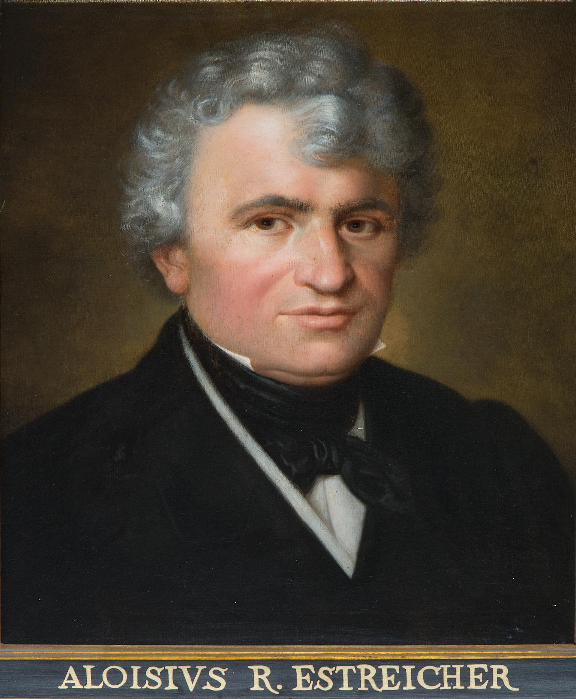 Alojzy Rafał Estreicher profesor i rektor Uniwersytetu Jagiellońskiego